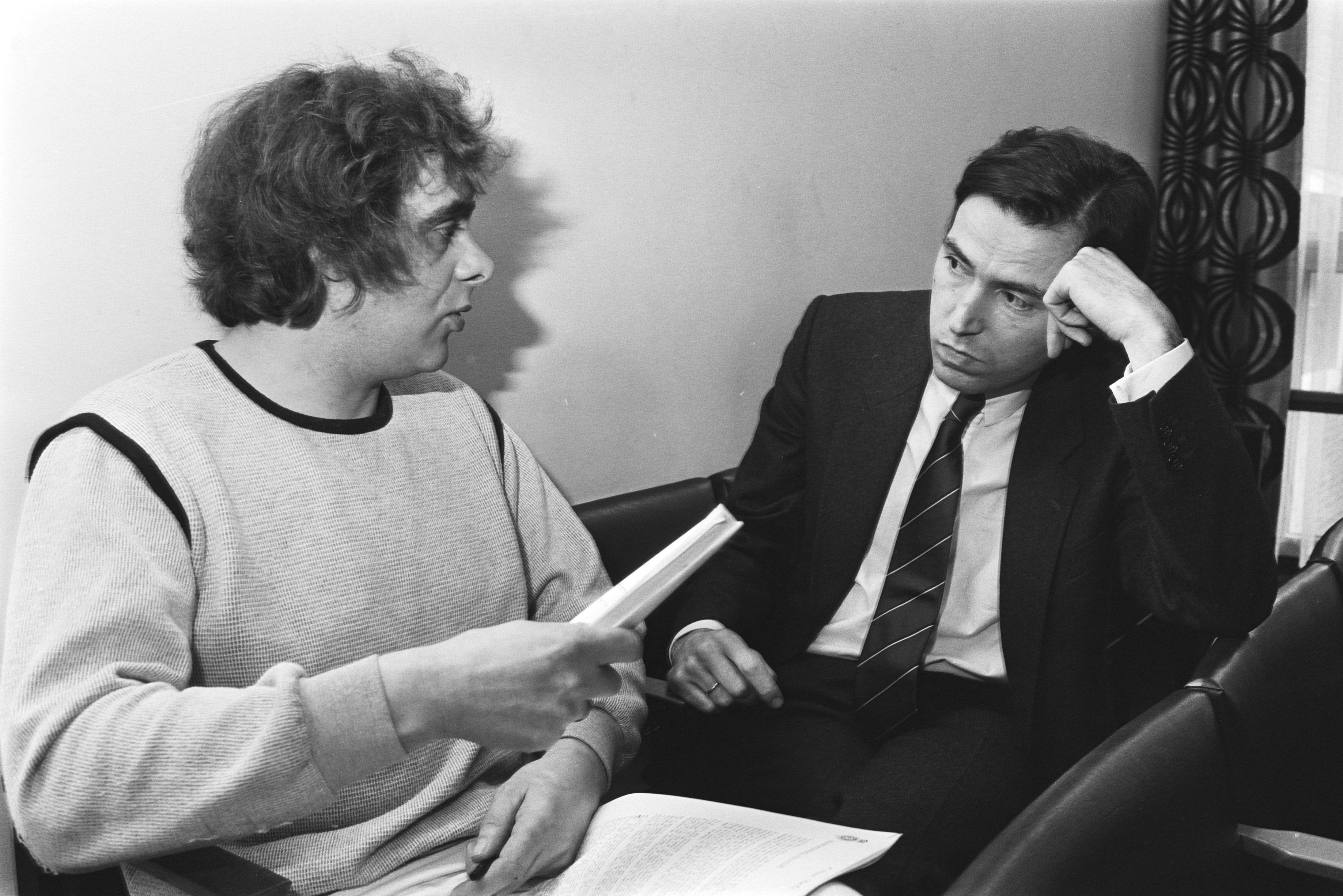 Collectie / Archief : Fotocollectie Anefo Reportage / Serie : [ onbekend ] Beschrijving : Den Haag , minister Brinkman (WVC) praat met BBK-voorz. Henk Rijzinga (l) over de bezetting van het Van Goghmuseum Datum : 2 februari 1984 Locatie : Den Haag, Zuid-Holland Trefwoorden : BEZETTING, ministers Persoonsnaam : Brinkman, Elco, Henk Rijzinga Instellingsnaam : Rijksmuseum Vincent van Gogh Fotograaf : Antonisse, Marcel / Anefo Auteursrechthebbende : Nationaal Archief Materiaalsoort : Negatief (zwart/wit) Nummer archiefinventaris : bekijk toegang 2.24.01.05 Bestanddeelnummer : 932-8530